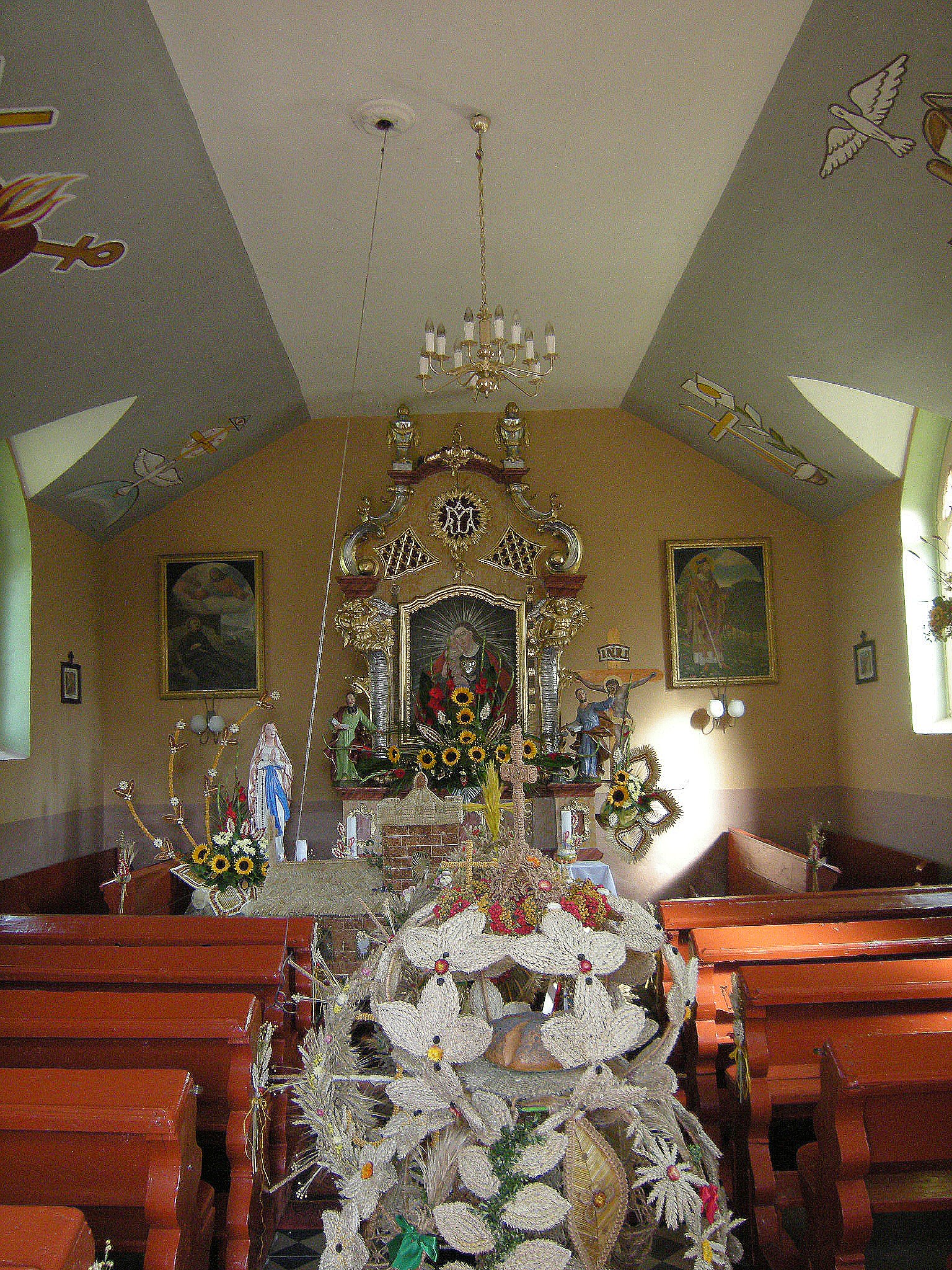 Kaplica w Broniszowicach w Gminie Otmuchów W akplicy korony żniwne po dożynkach parafialnych 2012.